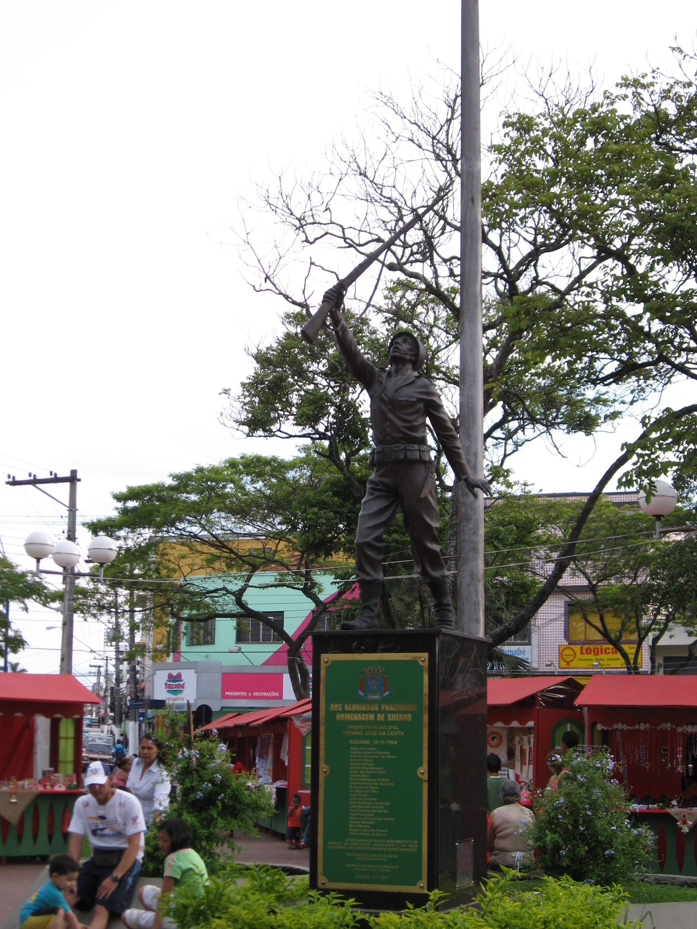 Monumento em Suzano - SP.